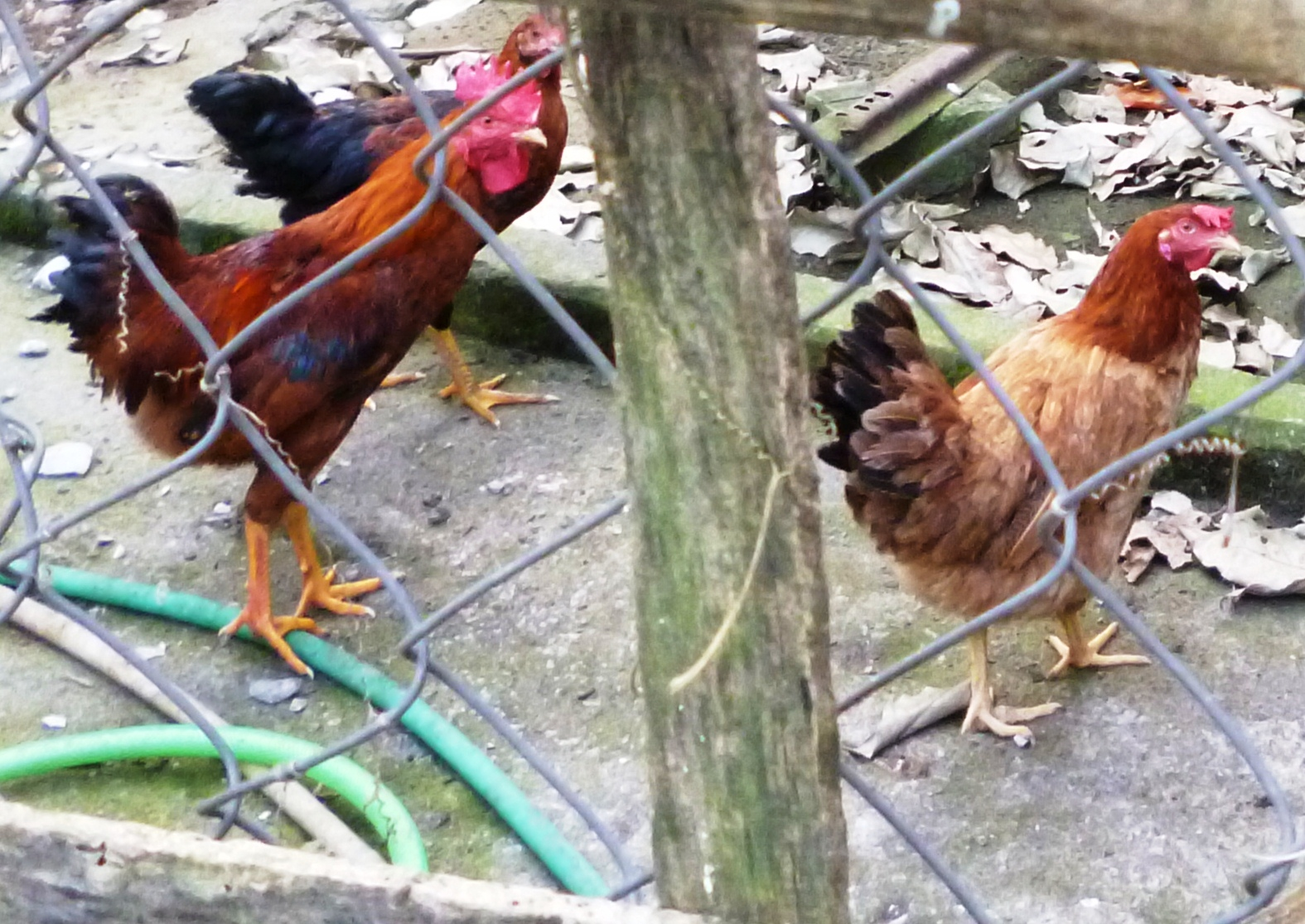 Hình chụp giống gà ta thả vườn (gà mía) bằng máy ảnh cá nhân